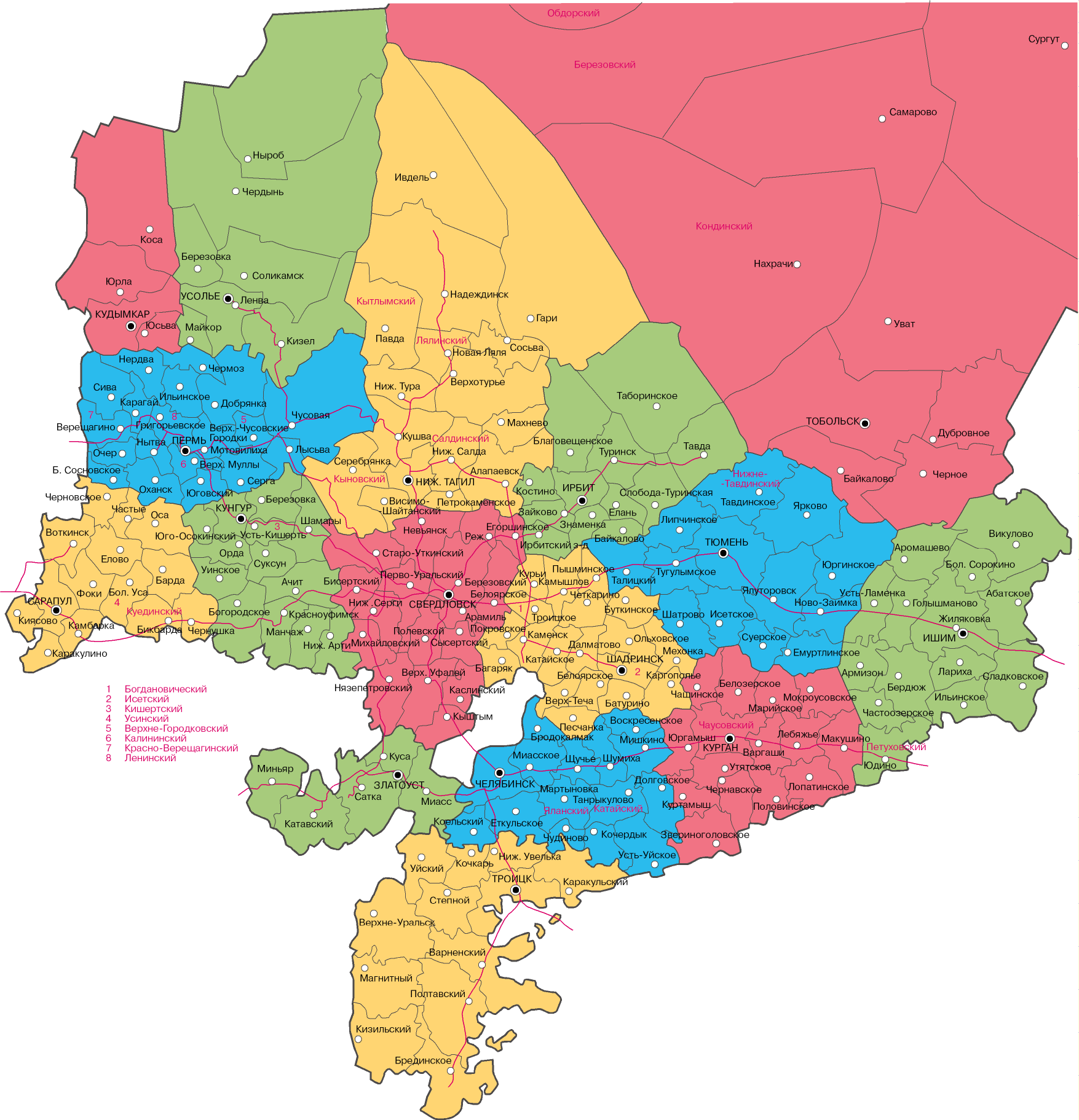 Карта Уральской области на 1 января 1926 (без севера Тобольского округа)